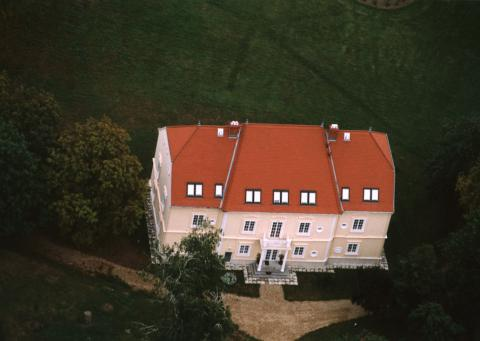 Bókaháza, Hungary, aerial photography (Botka Mansion)